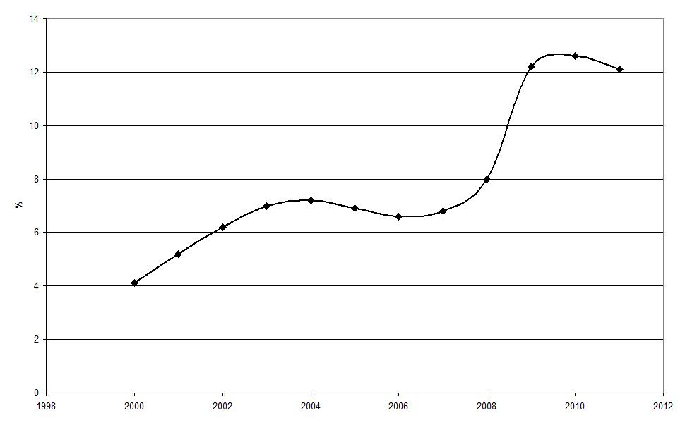 Taux de chômage à Hartford (Michigan, Etats-Unis).